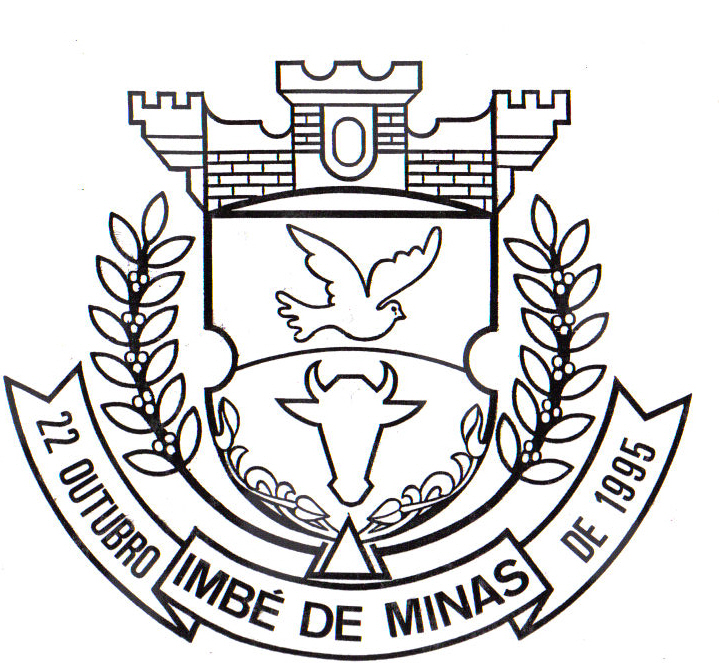 Brasão da cidade de Imbé de Minas